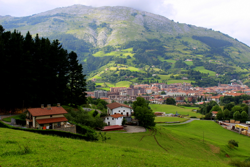 Azpeitia eta Izarraitz mendilerroa